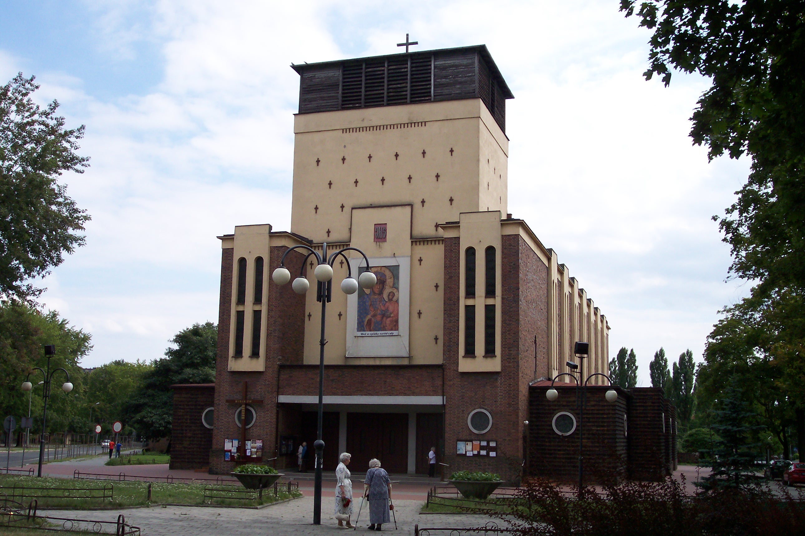 Kościół Chrystusa Króla w Gliwicach